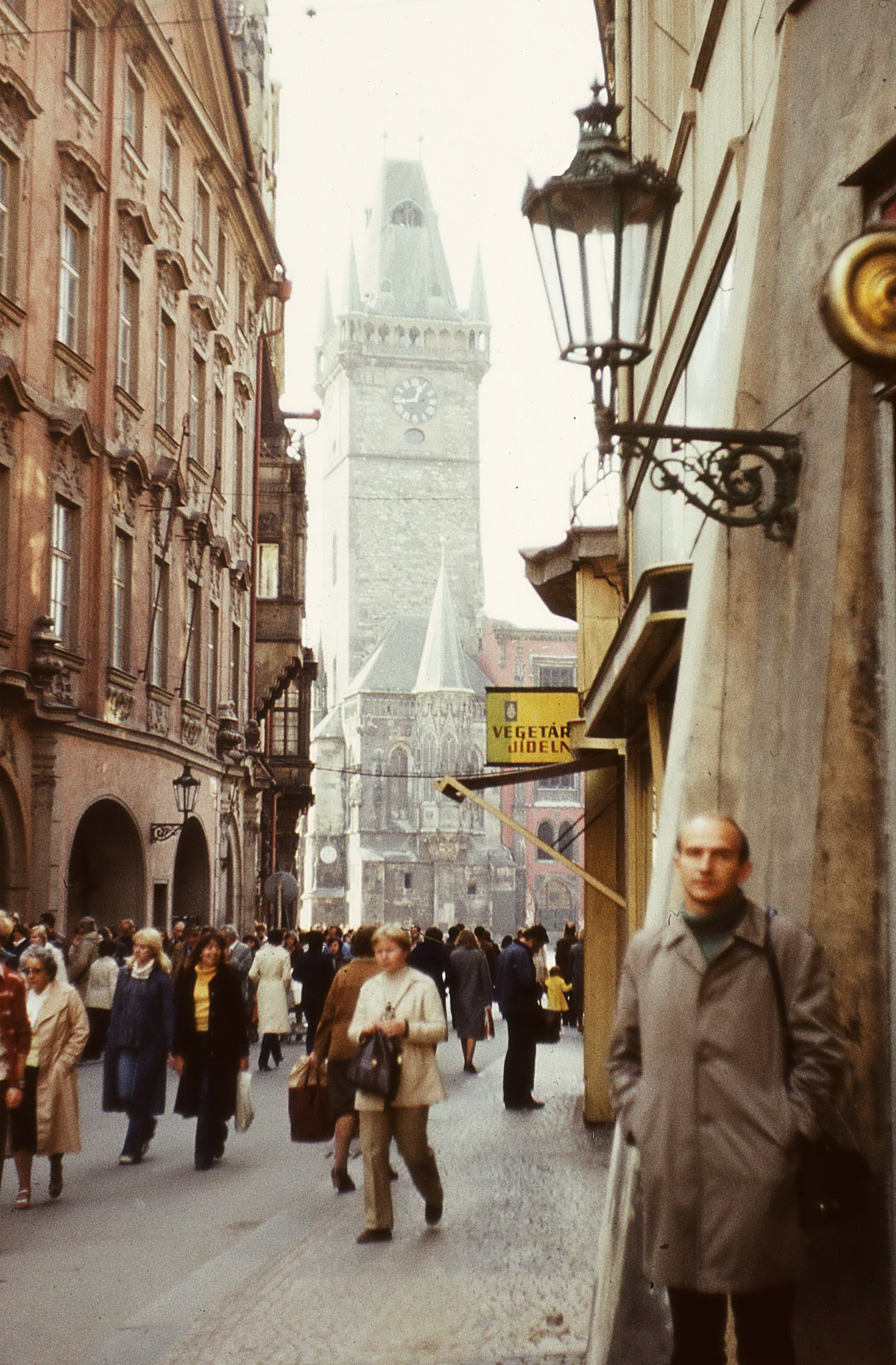 az Óratorony az Óváros téren (Staromestske namesti). Location: Czech Republik, Prague Tags: Czechoslovakia, colorful Title: az Óratorony az Óváros téren (Staromestske namesti).